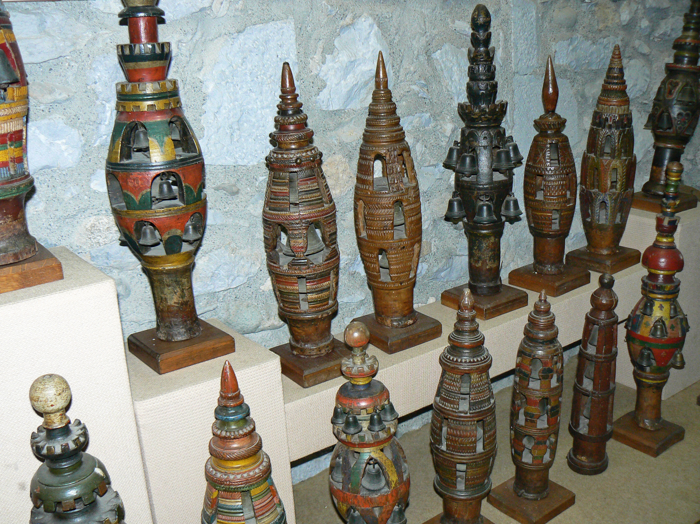 Surjoug ou pièce de bois en forme de clocher, garnie de sonnailles, placée sur le joug des bœufs, en Midi Toulousain, 19ème siècle.